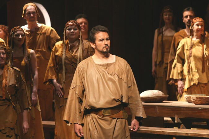 Martin Bárta, český operní zpěvák-barytonista (v roli Přemysla ve Smetanově opeře Libuše)